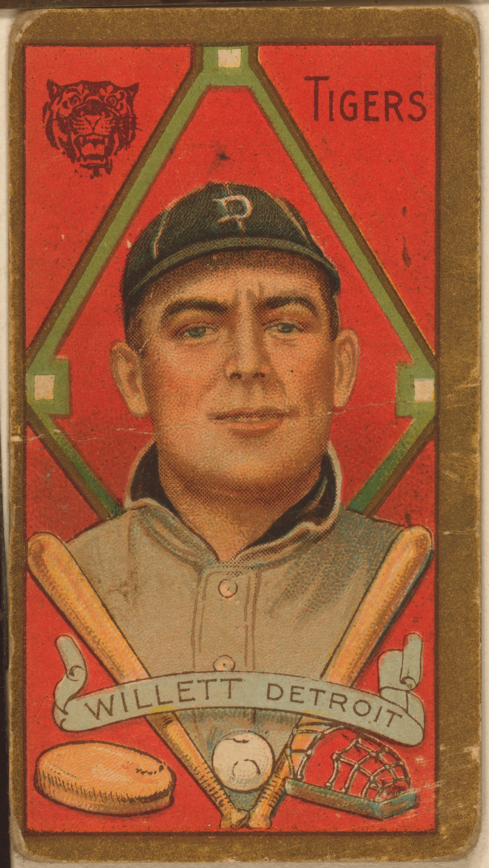 Edgar Willett